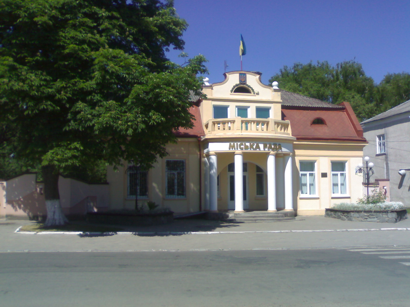 Міська рада міста Ходорів